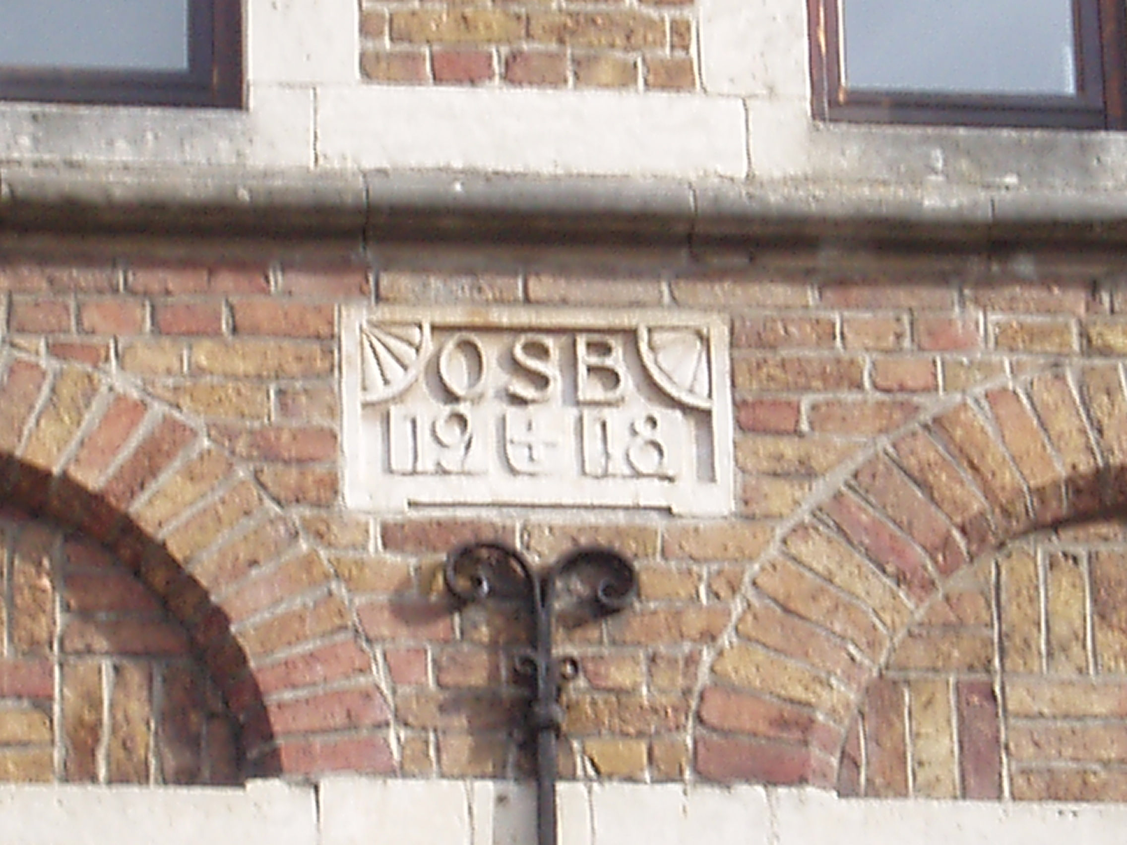 Nieuwstraat 8 Tienen opschrift OSB